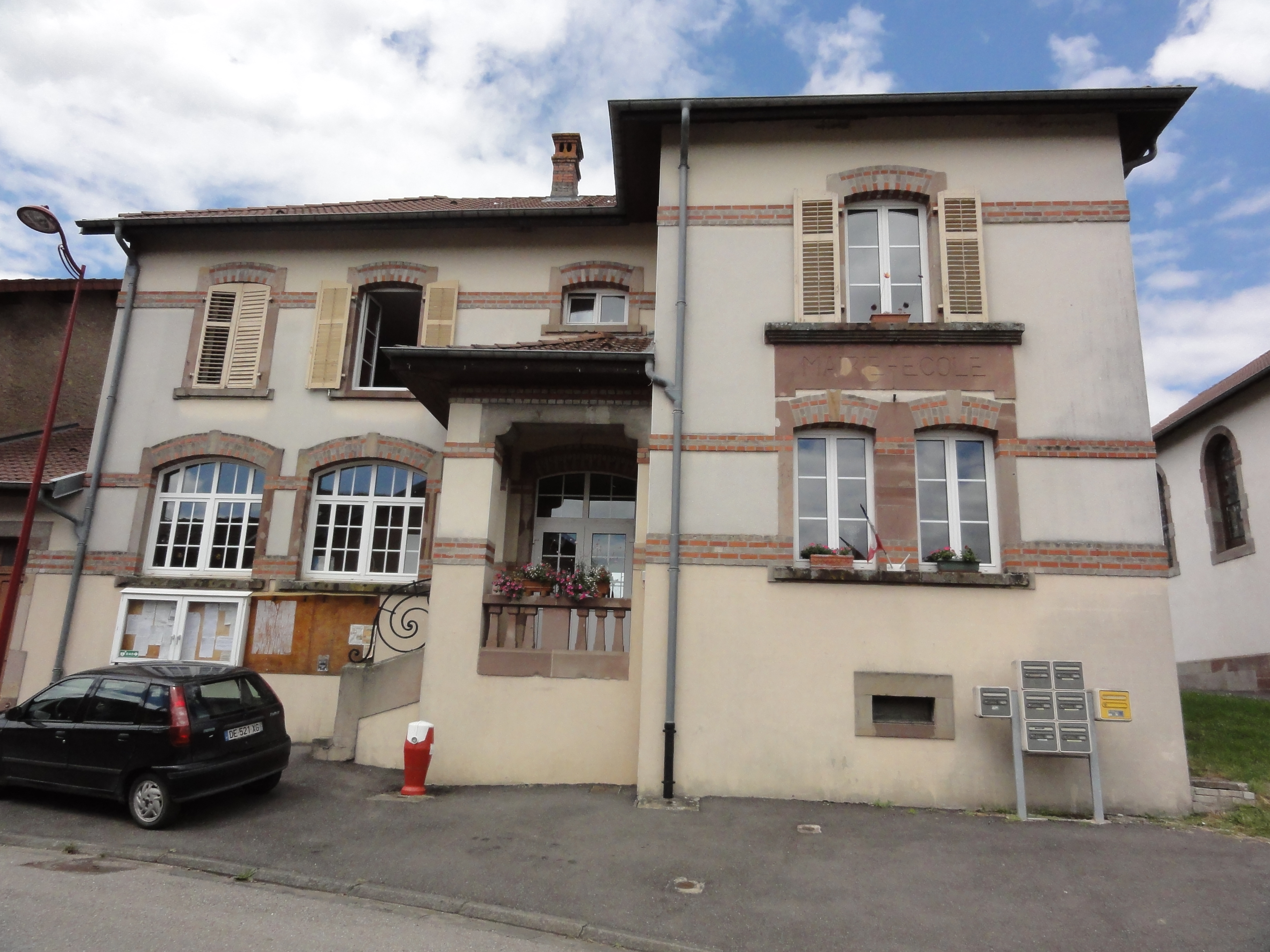 Chazelles-sur-Albe (M-et-M) mairie - école